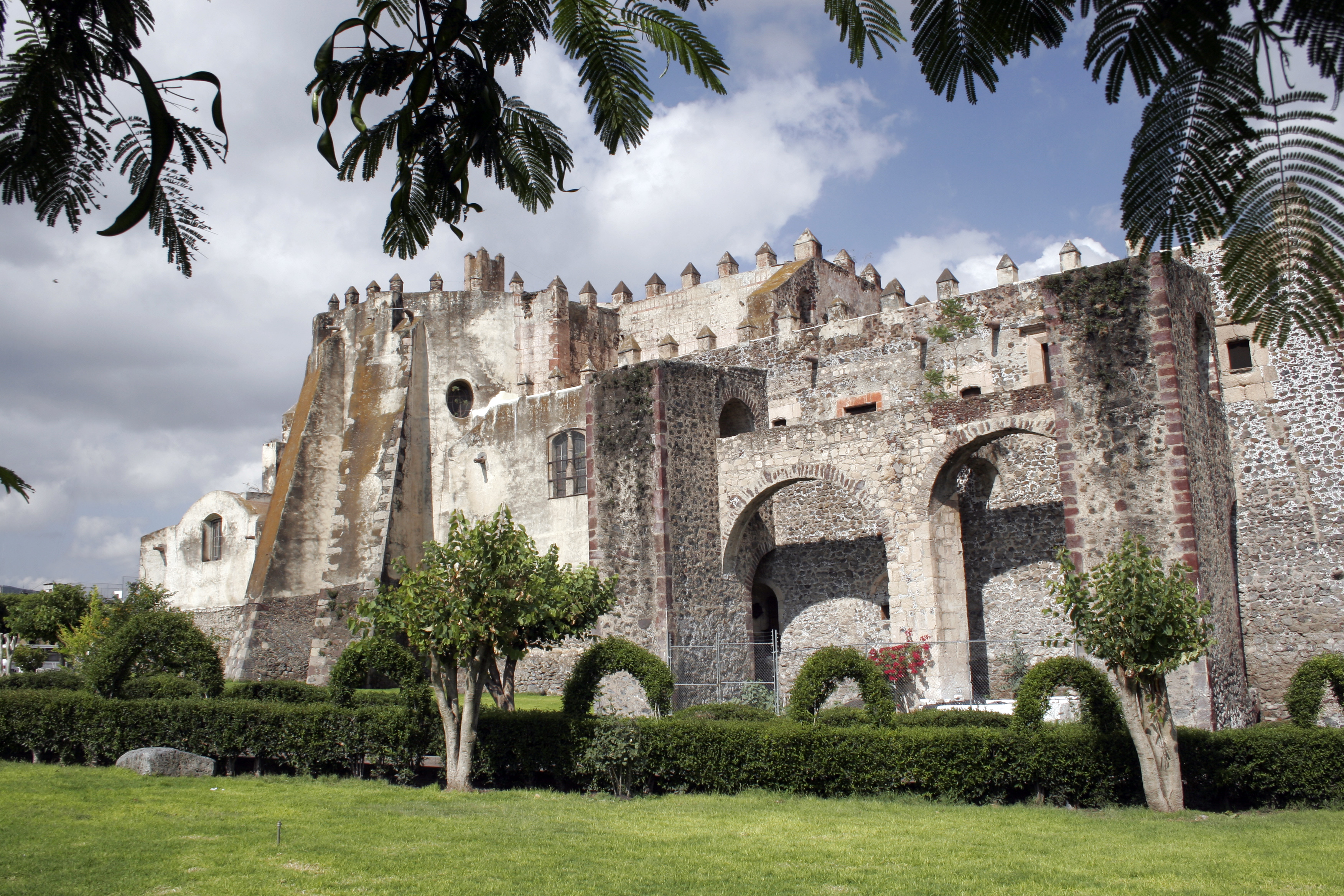 Convento de San Agustín de Yuriria, fundado en 1550 por los Agustinos, Yuriria, Guanajuato, México - San Agustín de Yuriria Convent, founded by the Agustines in 1550, Yuriria, Guanajuato, Mexico